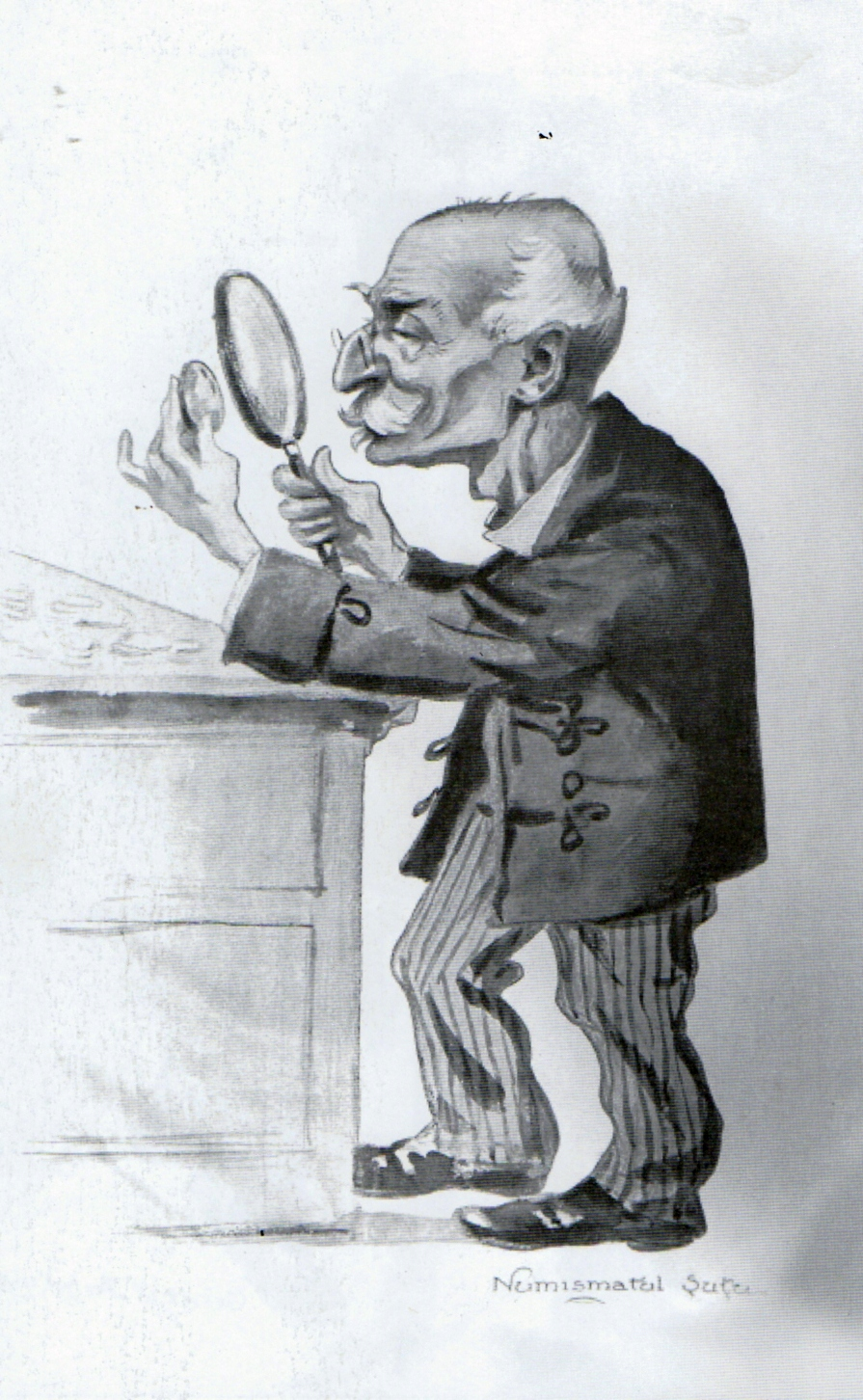 Numismatul Mihail Șuțu. Caricatură din Albumul meu.